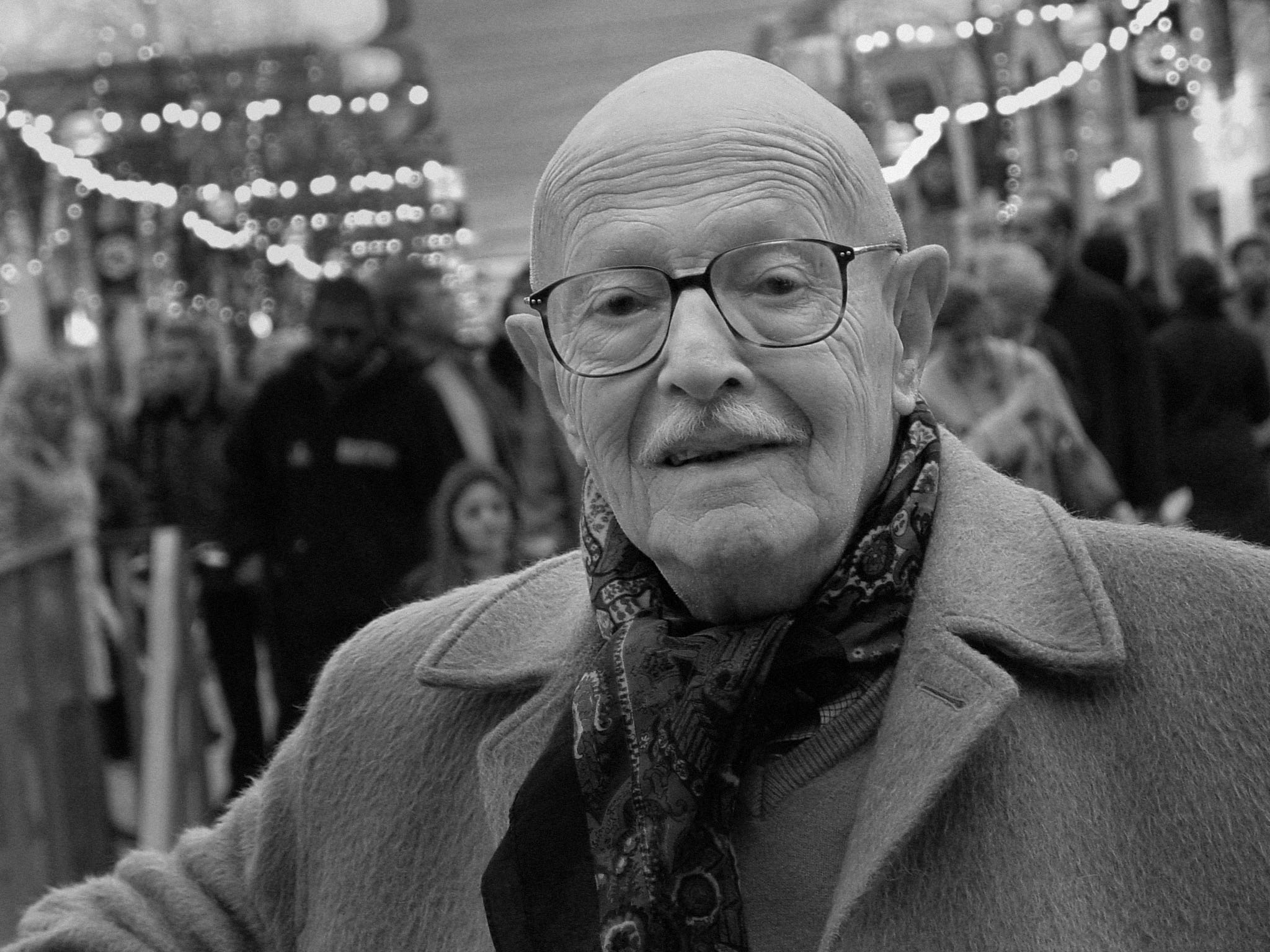 Willy Ronis, le 20 janvier 2002